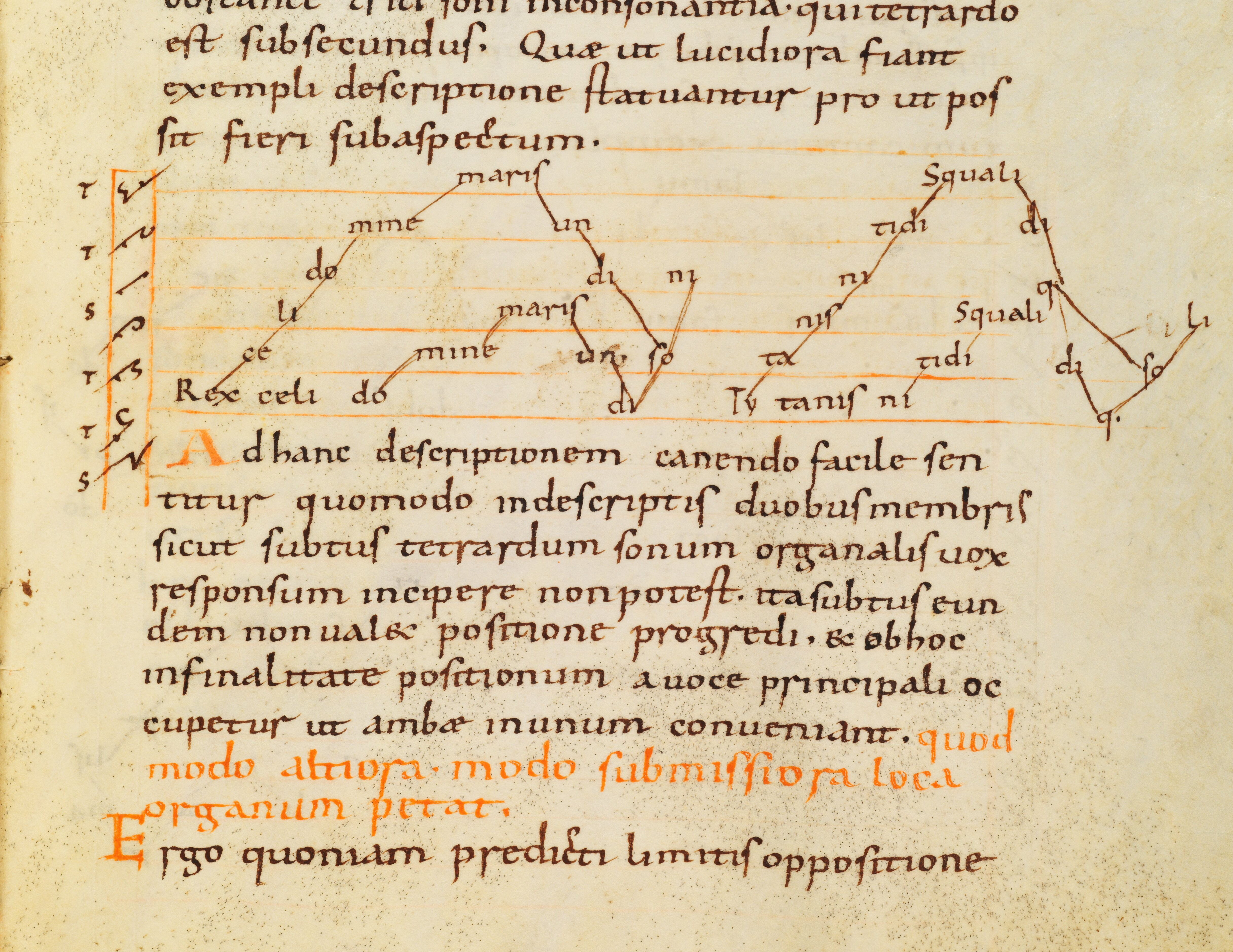 Früheste Darstellung eines Organums in einer theoretischen Schrift, der "Musica enchiriadis" aus dem späten 9. Jahrhundert